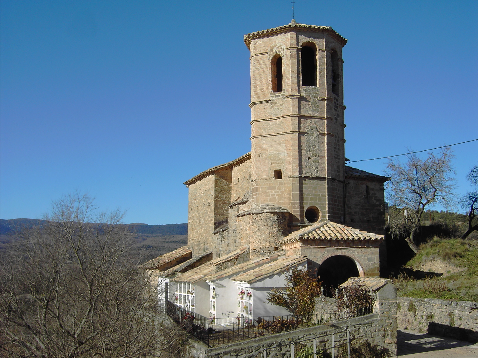 La iglesia de la localidad de Bárcabo, cabecera del municipio homónimo, constituido por diversos núcleos disperos en la tierra conocida como Biello Sobrarbe.